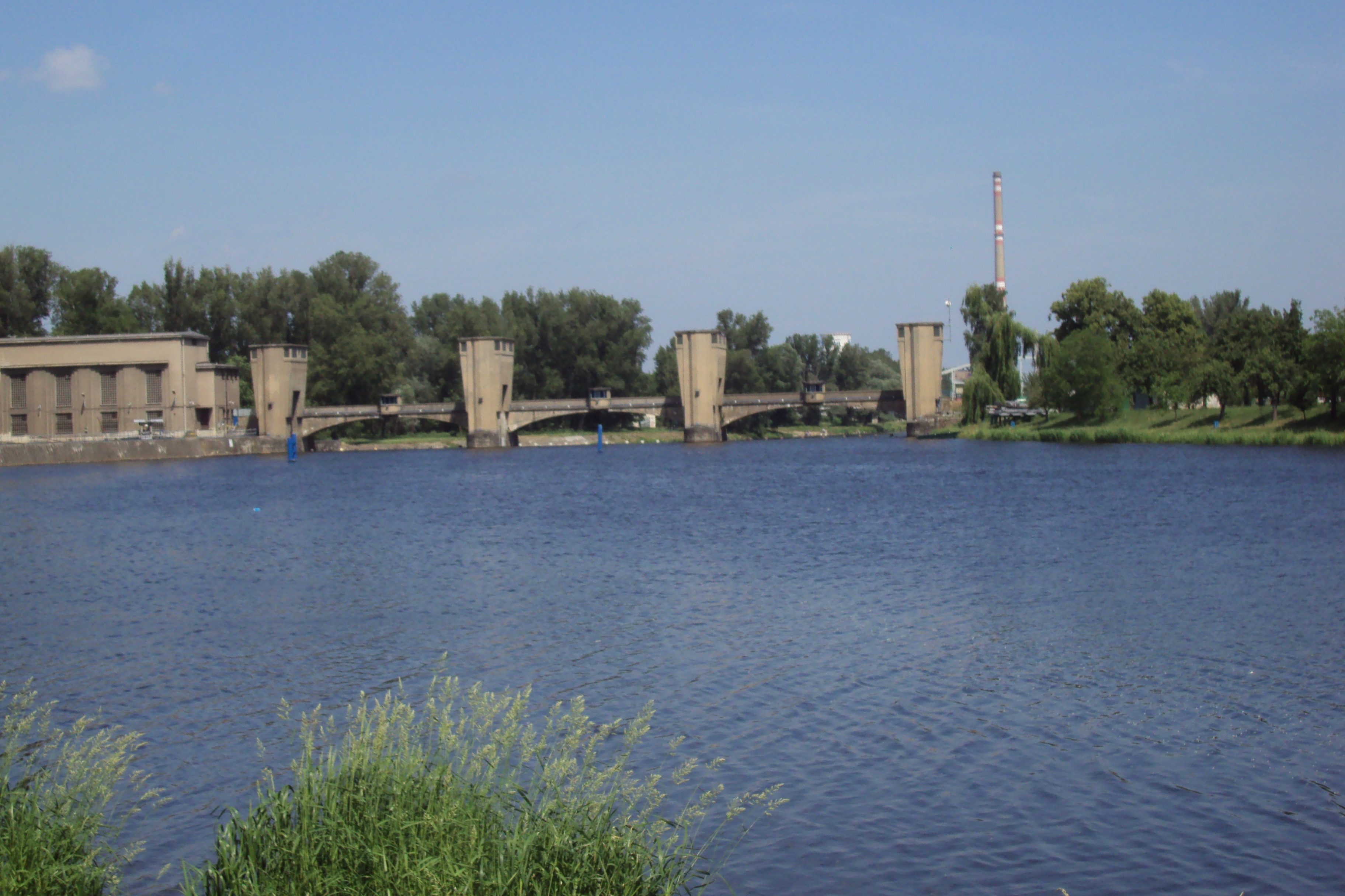 Jez se zdymadlem na Labi v Neratovicích